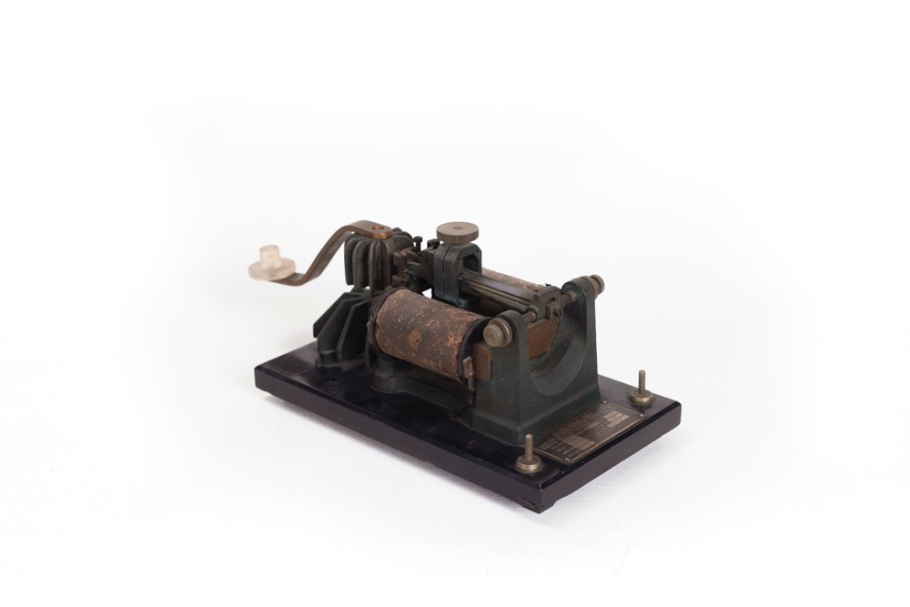 מכשיר מורס של גוליילמו מרקוני